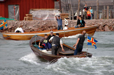 Mariehamn - Sjökvarteret. Photograph by Henryk Kotowski